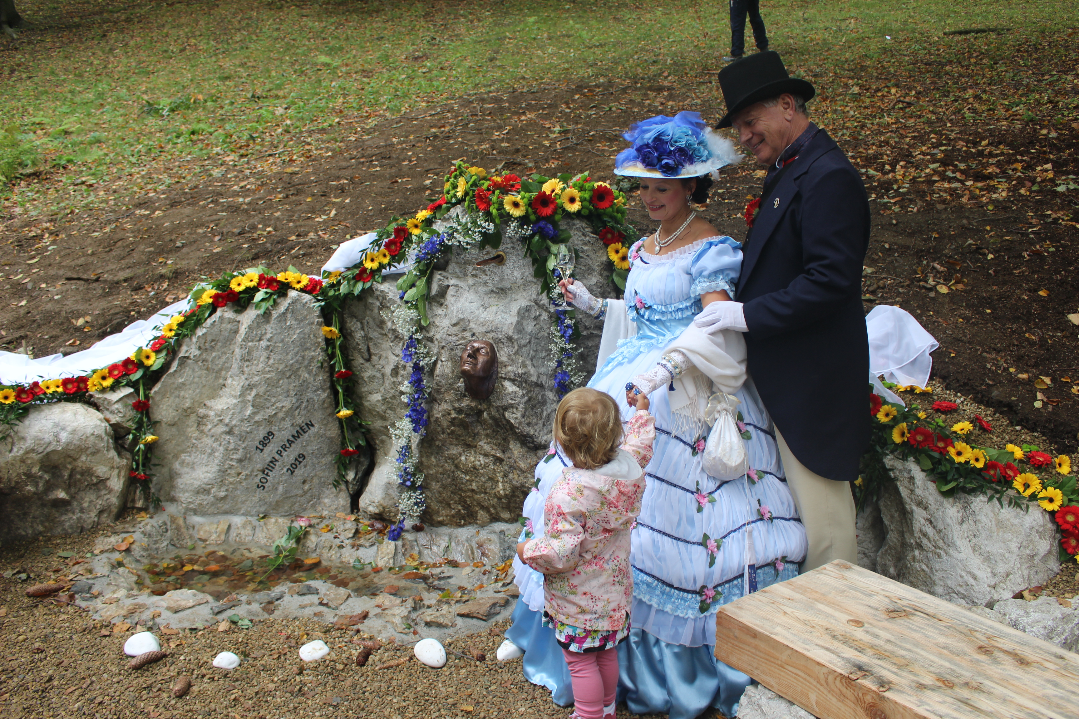 "Priessnitz se svou chotí" při slavnostním znovuodhalení Sofiina pramene po rekontrukci